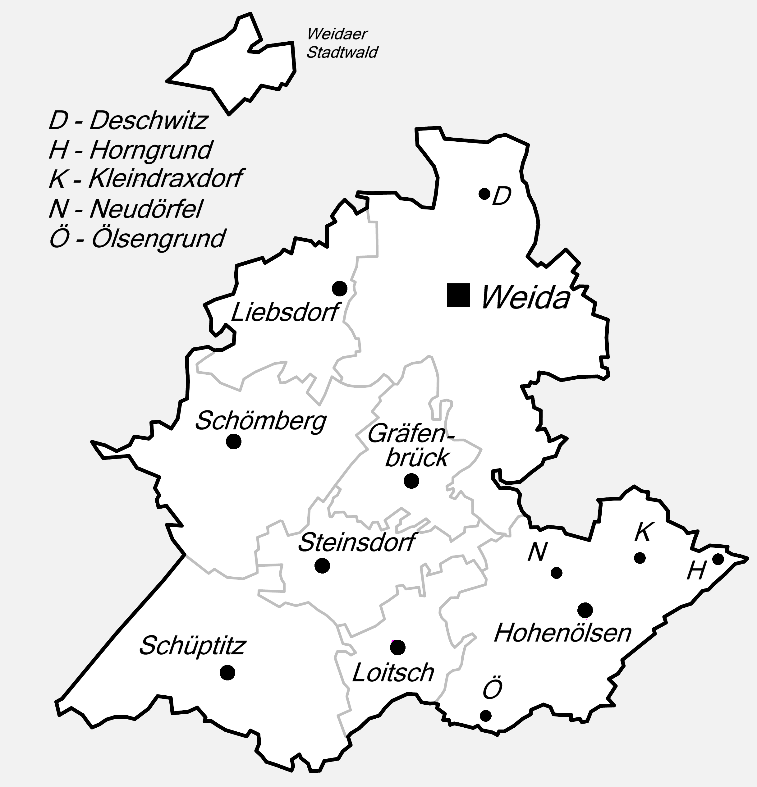 Karte zur Stadtgliederung von Weida im Landkreis Greiz.